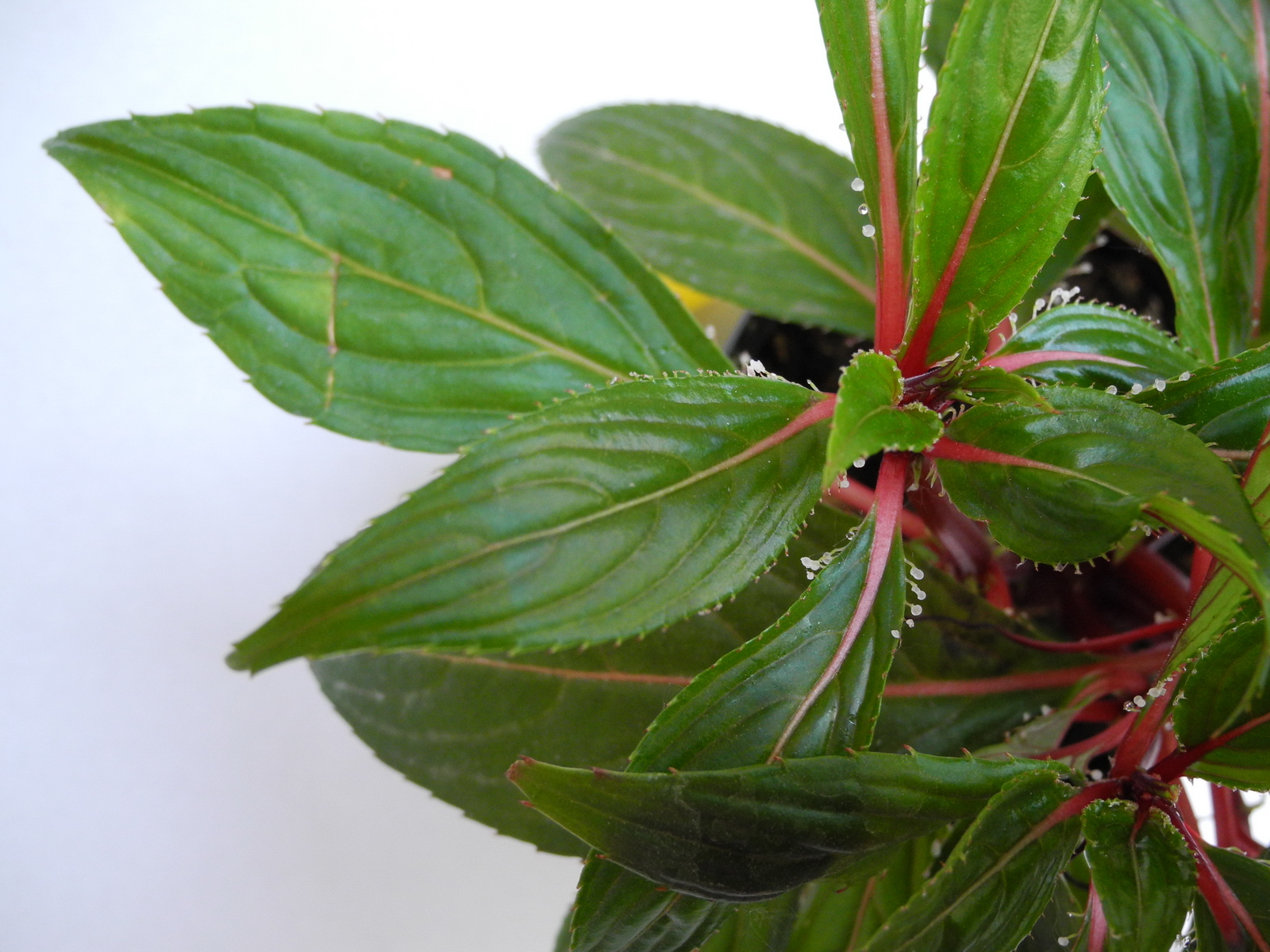 Сладкий сок и кристаллы сахара на листе бальзамина